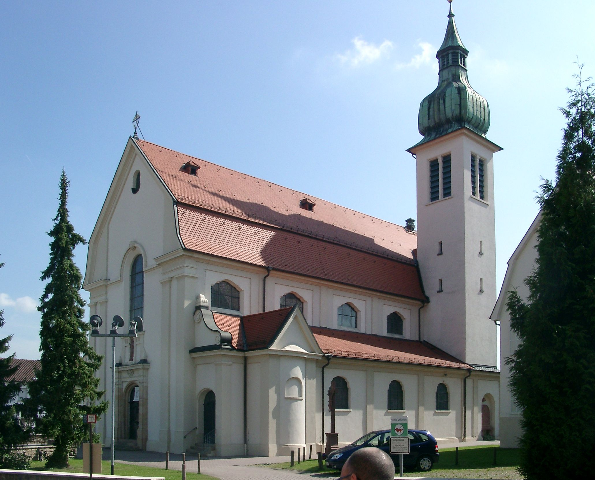 Obertshausen, Katholische St. Nikolaus Kirche